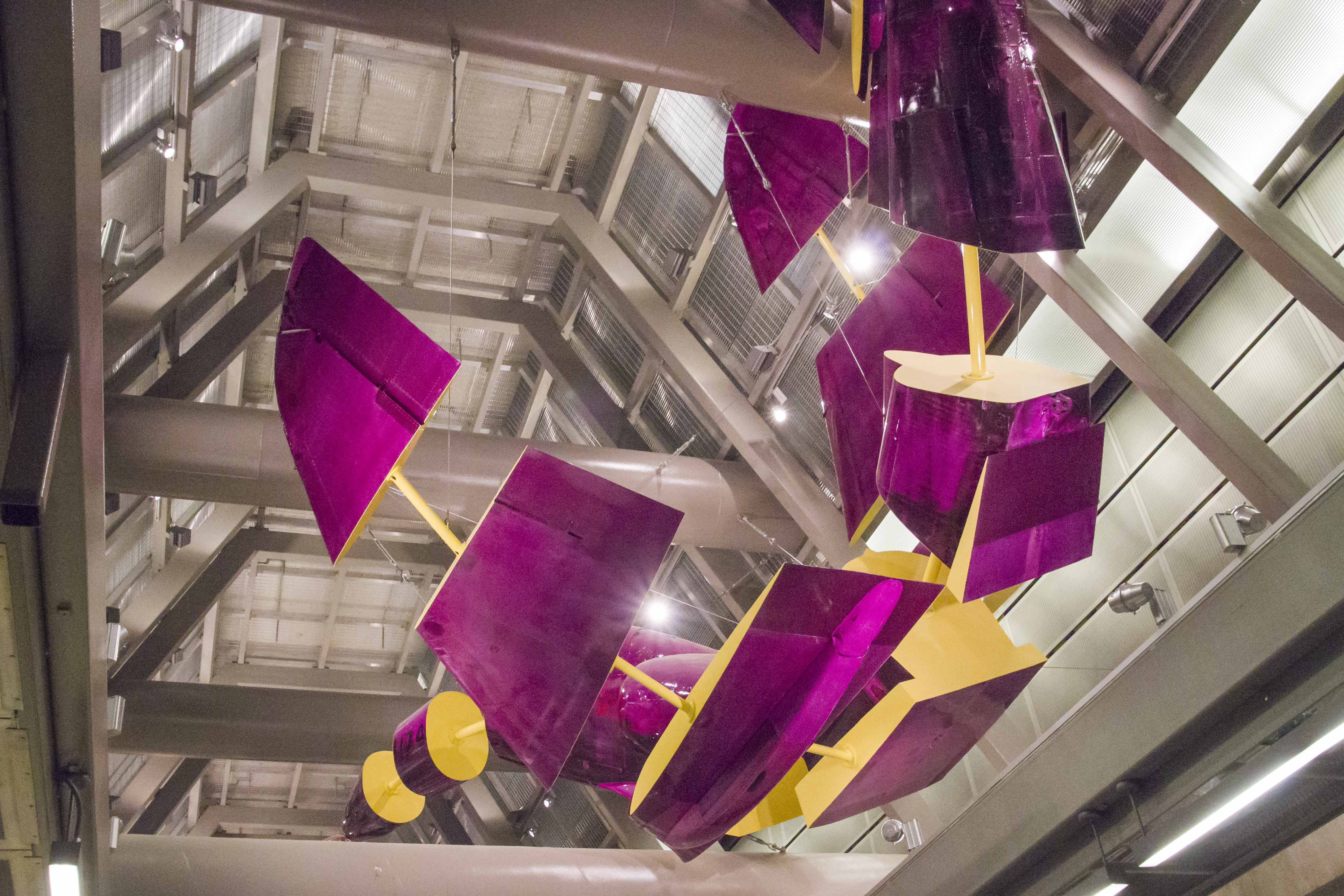 Capitol Hill Station Media Tour 05-26-15 05